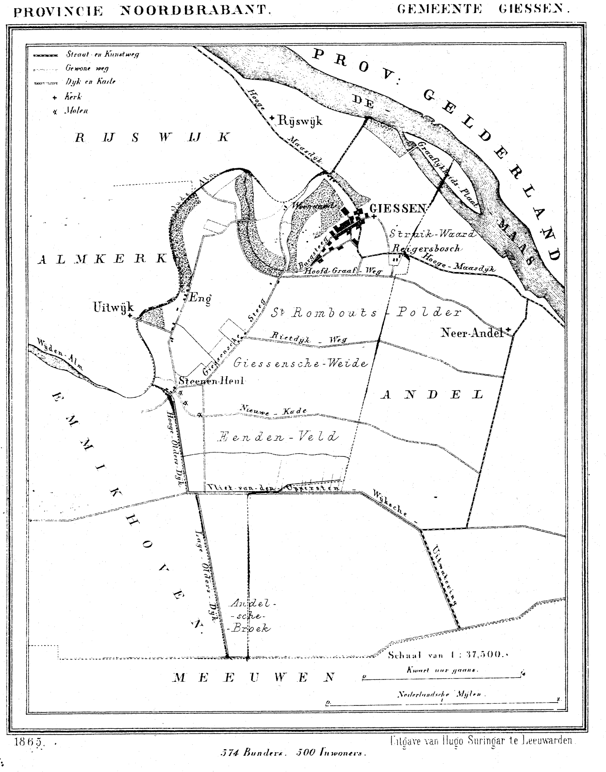 Nederland, Noord-Brabant, Gemeente Giessen